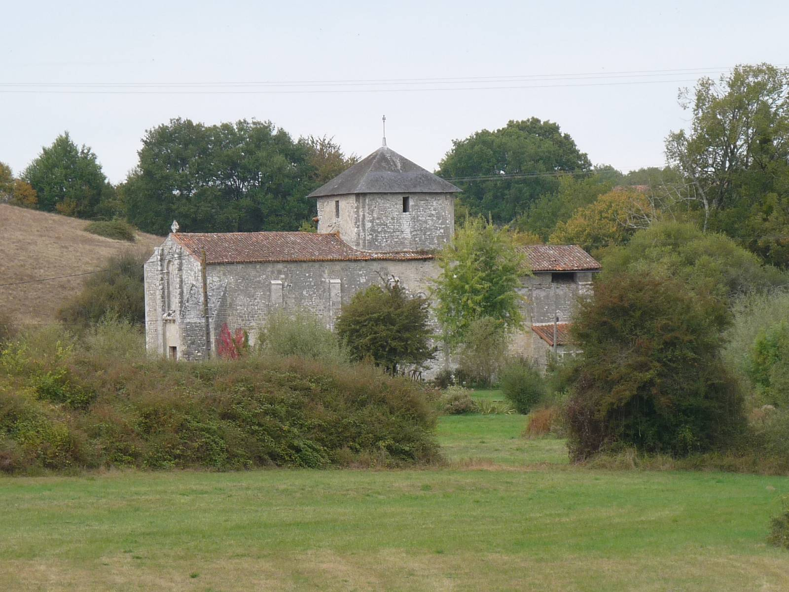 église de Vieux-Ruffec, Charente, France